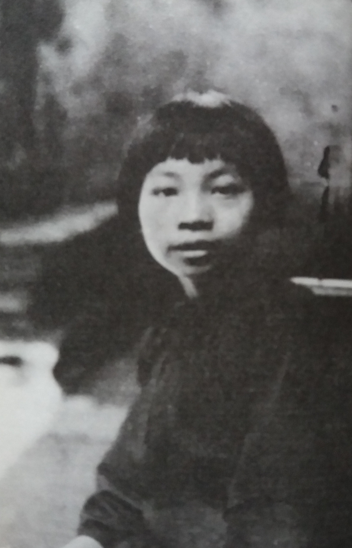 中文（中国大陆）: 王人美1926年